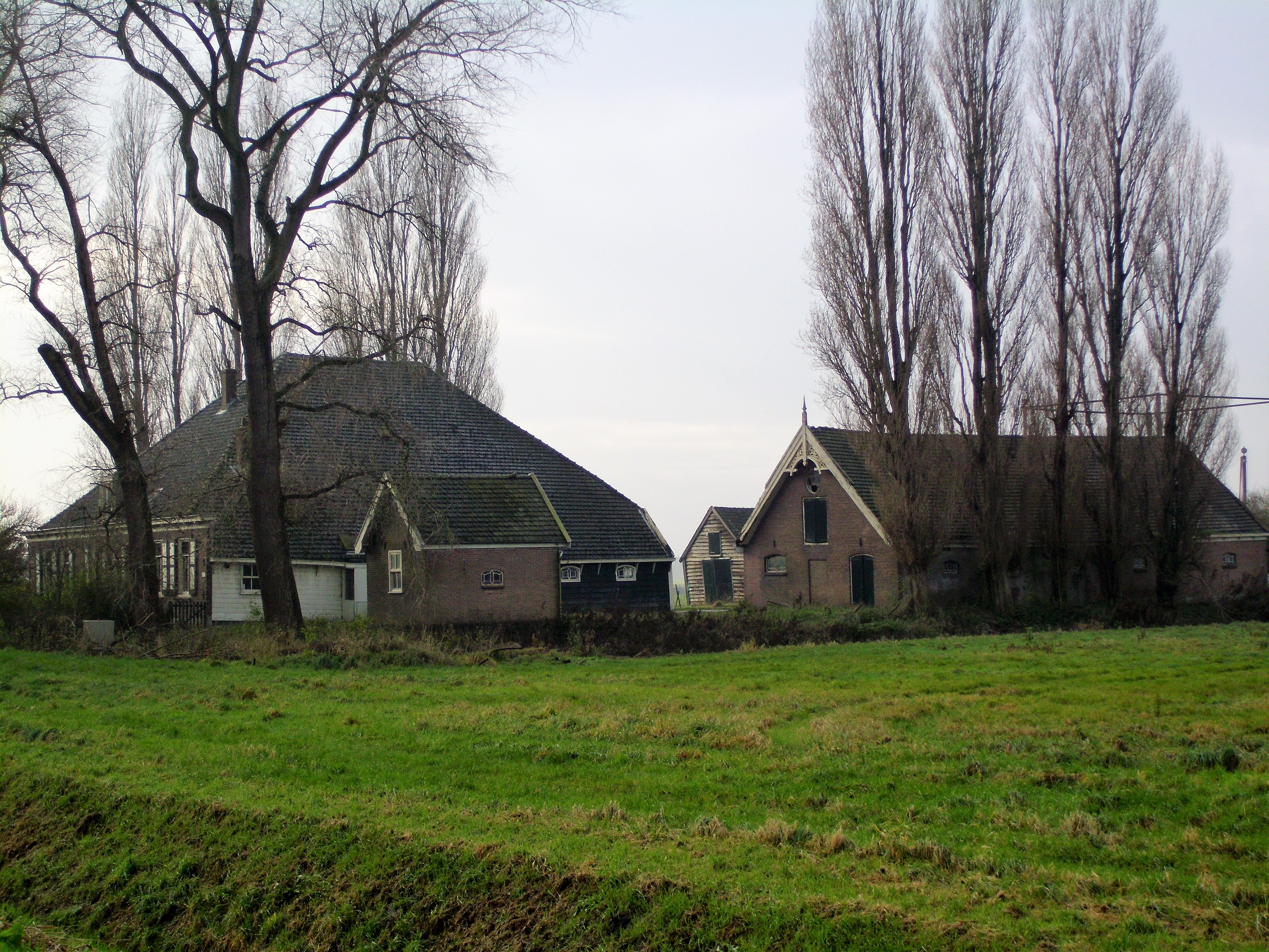 Boerderij 'Tijd is geld', Lutkemeerweg 180, Oud-Osdorp, Amsterdam